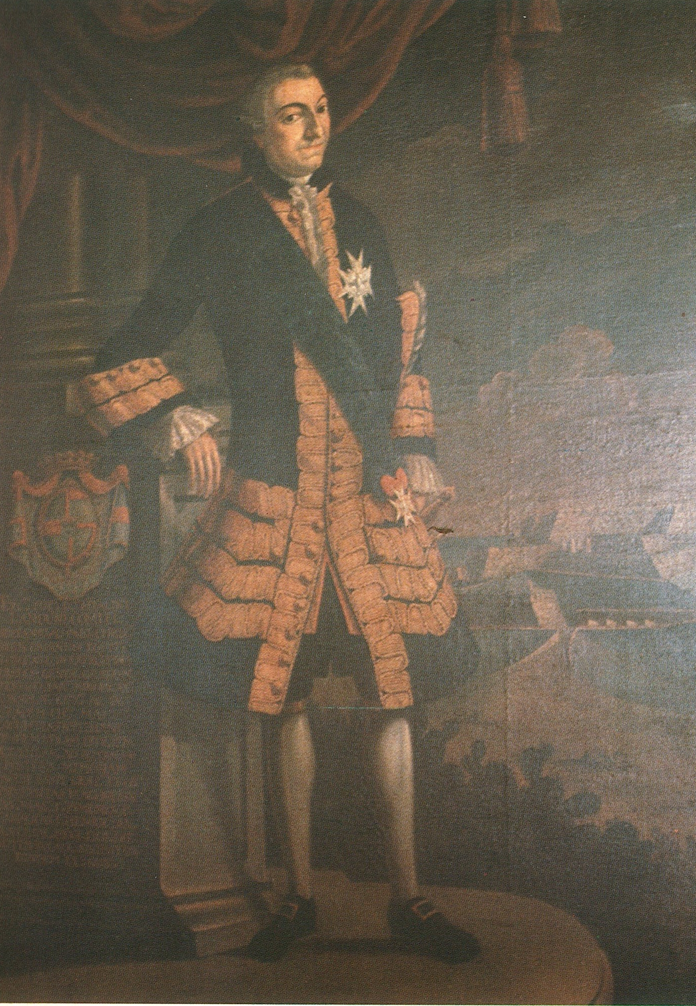 cuadro duque de lannion